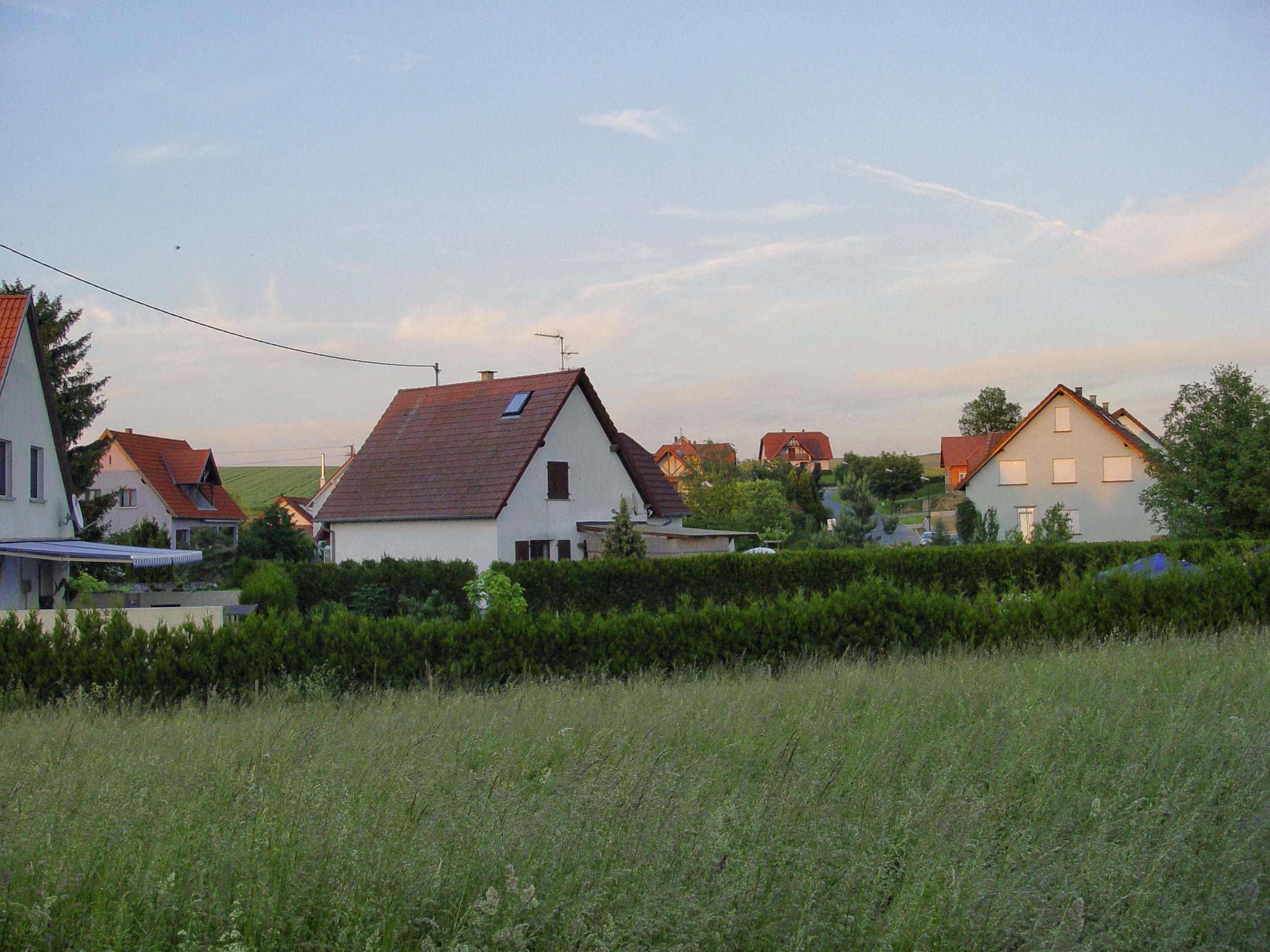 Kröttweiler im Abendrot.